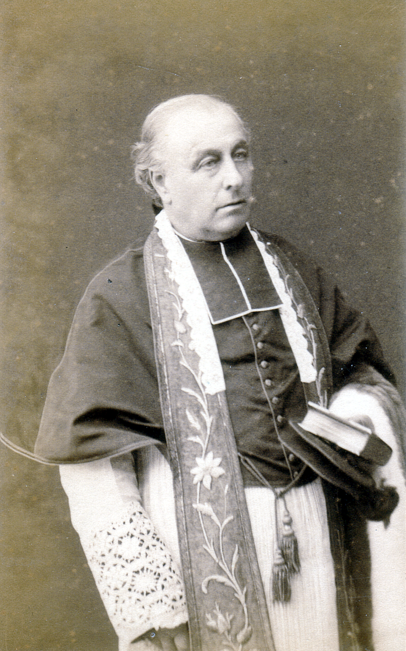 Photographie d'Abel Anastase Germain, Evêque de Coutances et de Granville 1894.